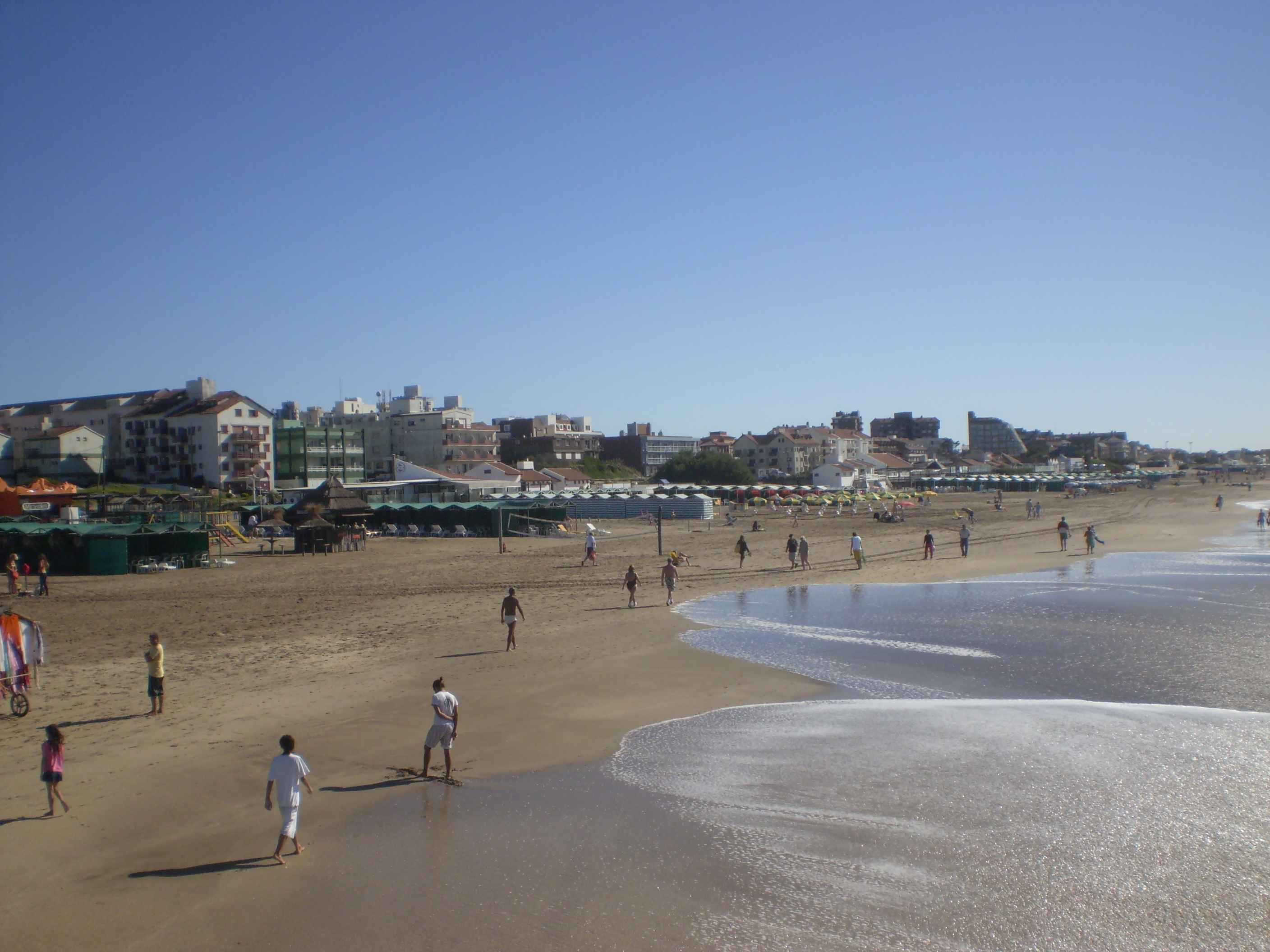 Pinamar, Argentina. Vista desde el muelle de pescadores hacia el norte.